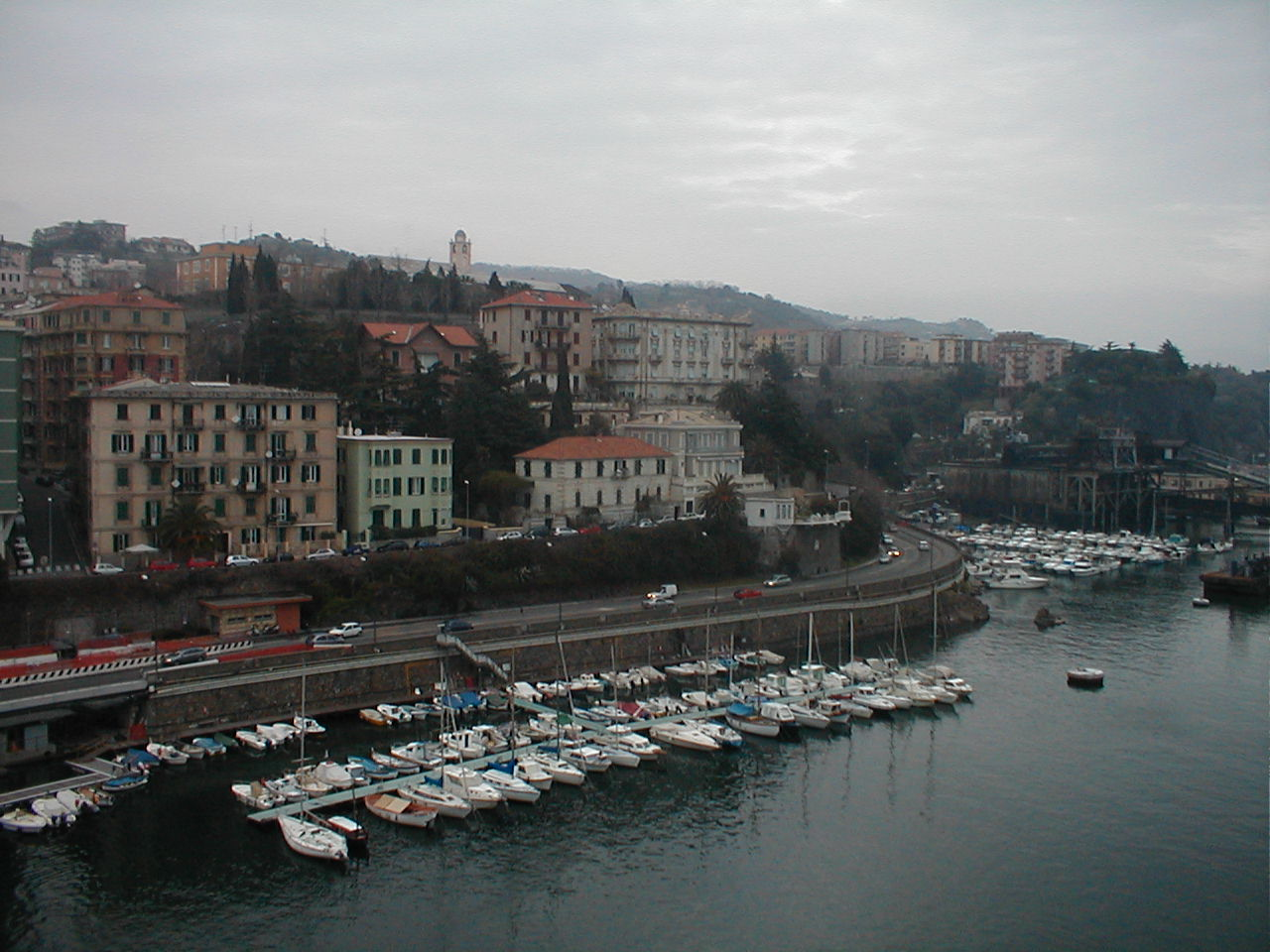 Savona, Italia